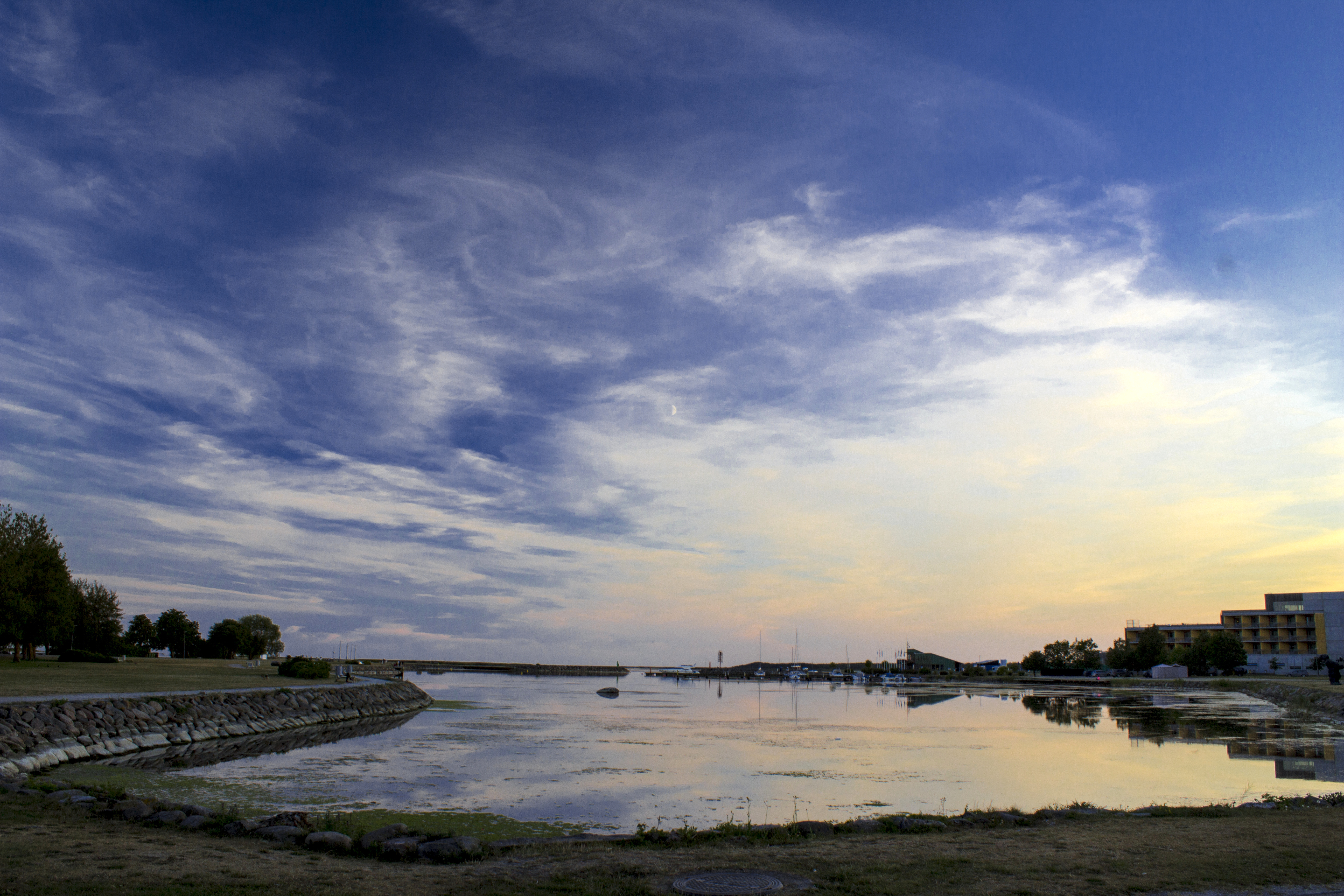 Tori abajas, Kuressaare